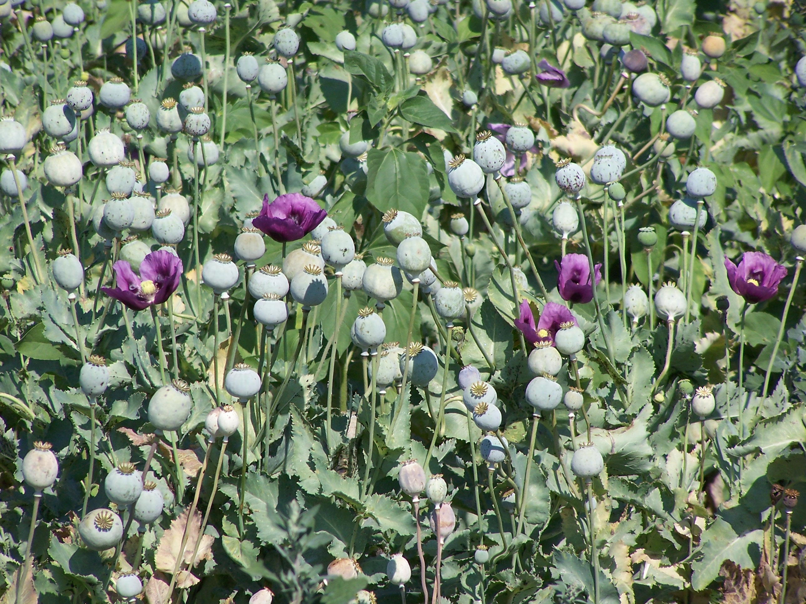 Haşhaş bitkisi: aşırı doz eroin zehirlenmelerinin kökeni